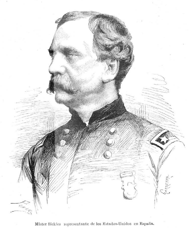 Mister Sickles, representante de los Estados-Unidos en España, en la revista española La Ilustración Española y Americana.